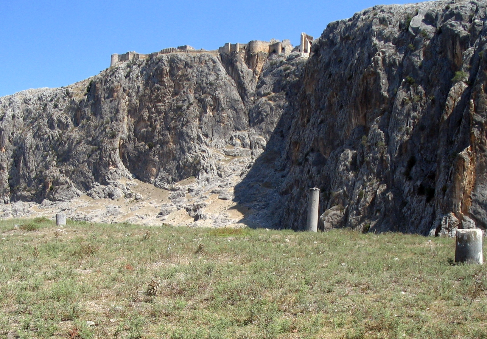 Akropolis von Anavarza (Anazarbos), Südtürkei bei Adana